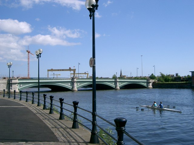 Albert Bridge, Belfast.